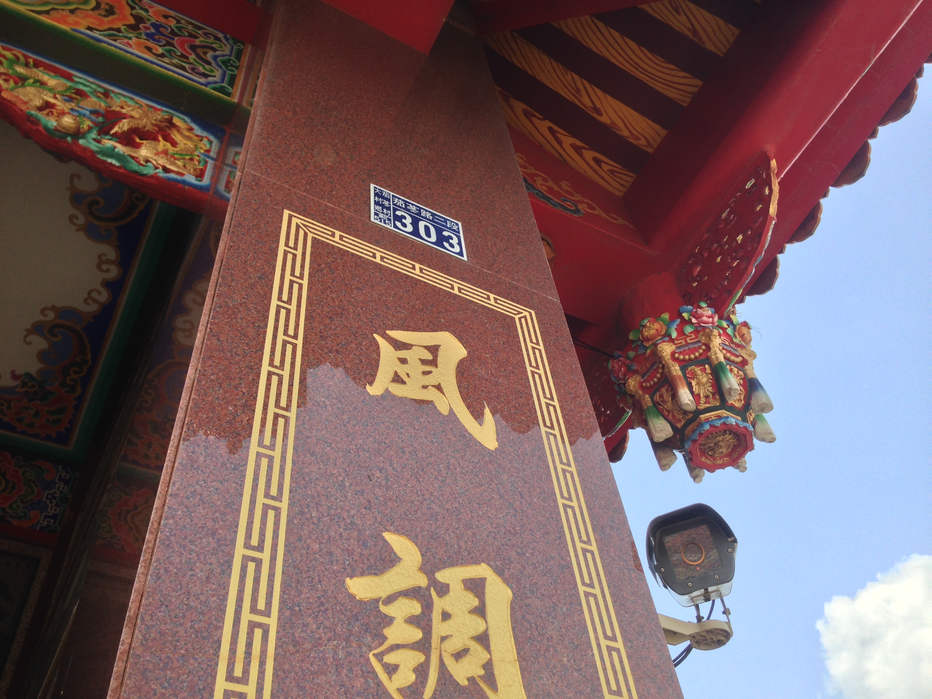 中文（台灣）: 淑女祠門牌